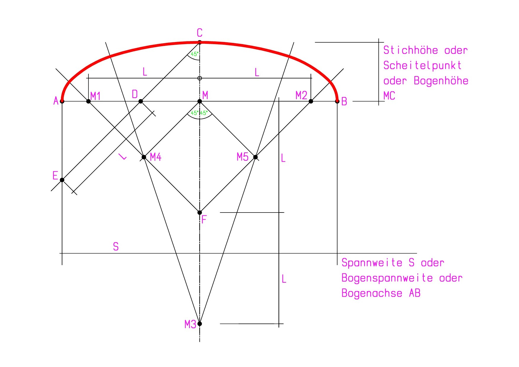 Konstruktion eines Korbbogens aus fünf Mittelpunkten (M1, M2, M3, M4, M5).